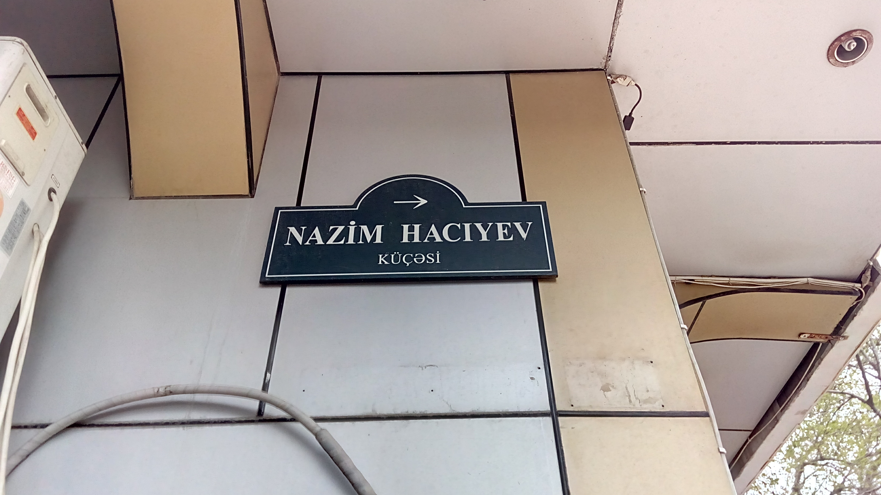 Bakı, Nazim Hacıyev küçəsi